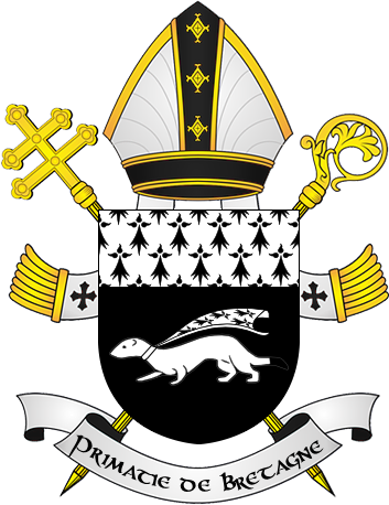 Blason - ancien primatie de Bretagne